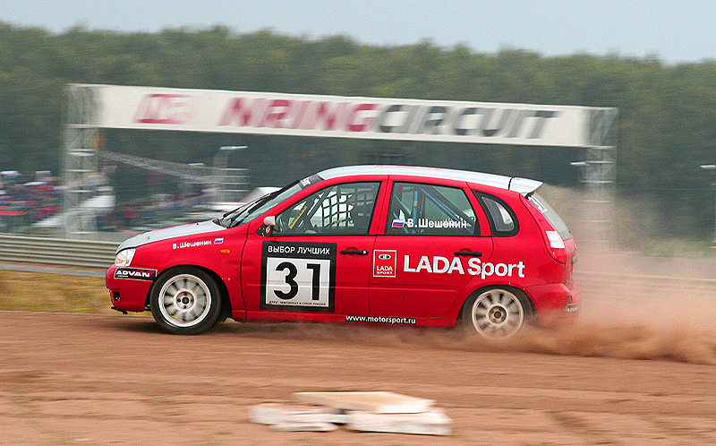 RTCC Национальный класс